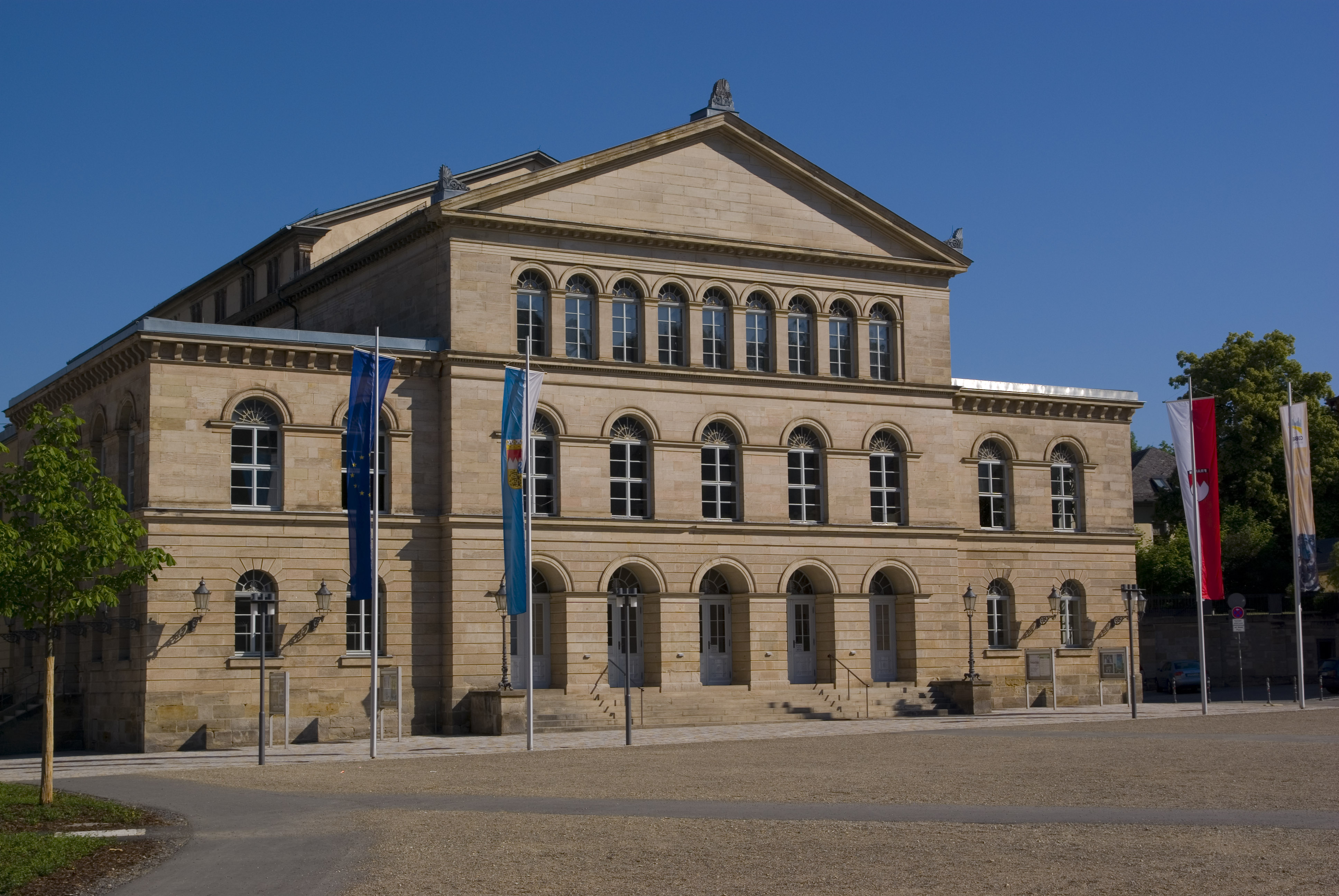 Landestheater in Coburg, Seite Schlossplatz